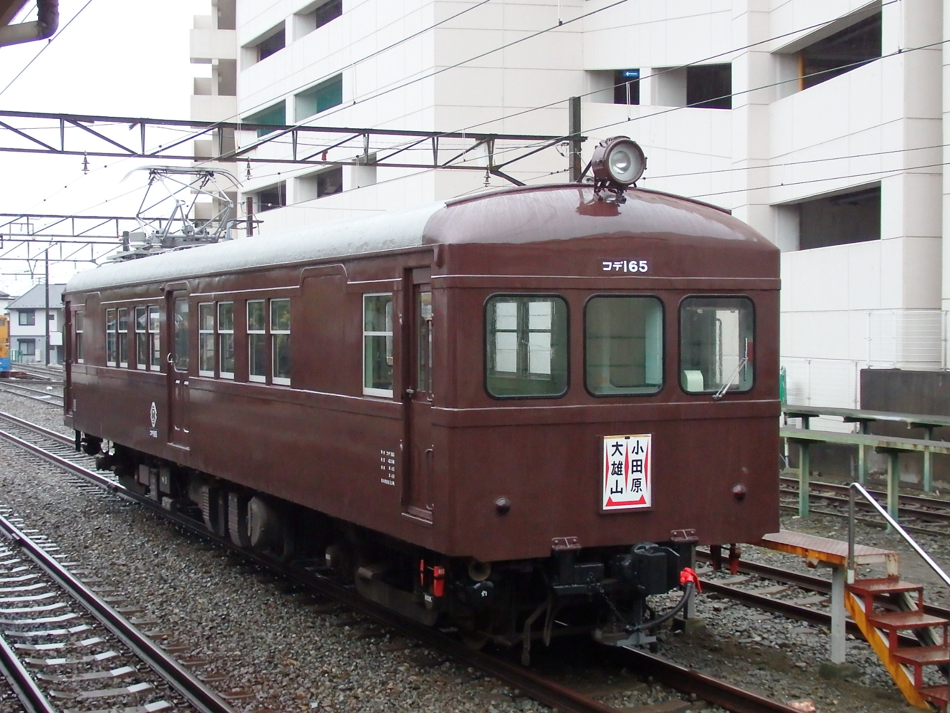 茶色塗装となったコデ165形電車（大雄山駅でのお披露目会終了直後に撮影）